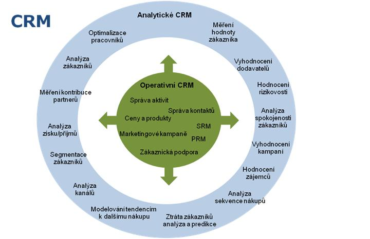 Analytické CRM